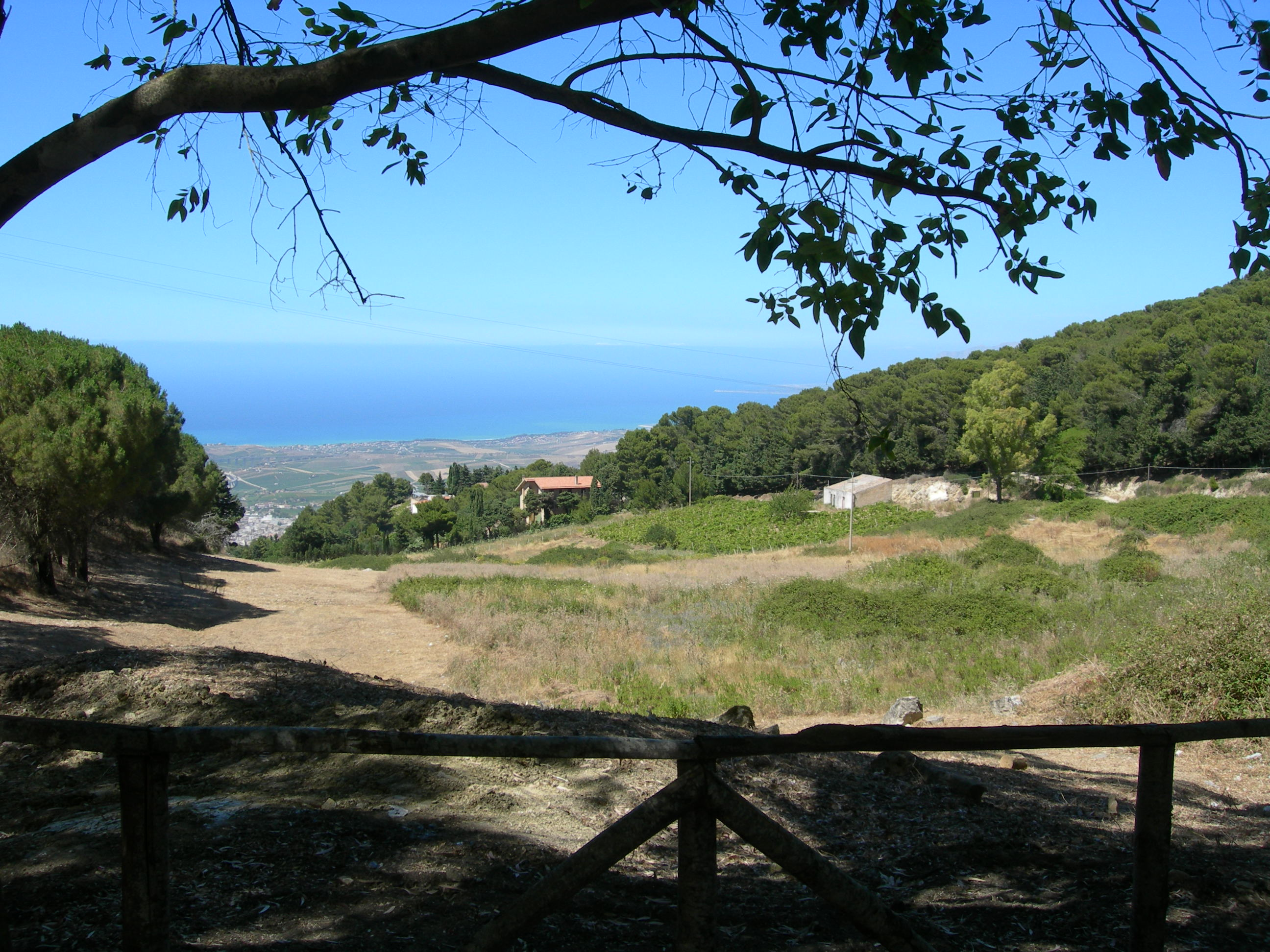 Riserva naturale Bosco di Alcamo